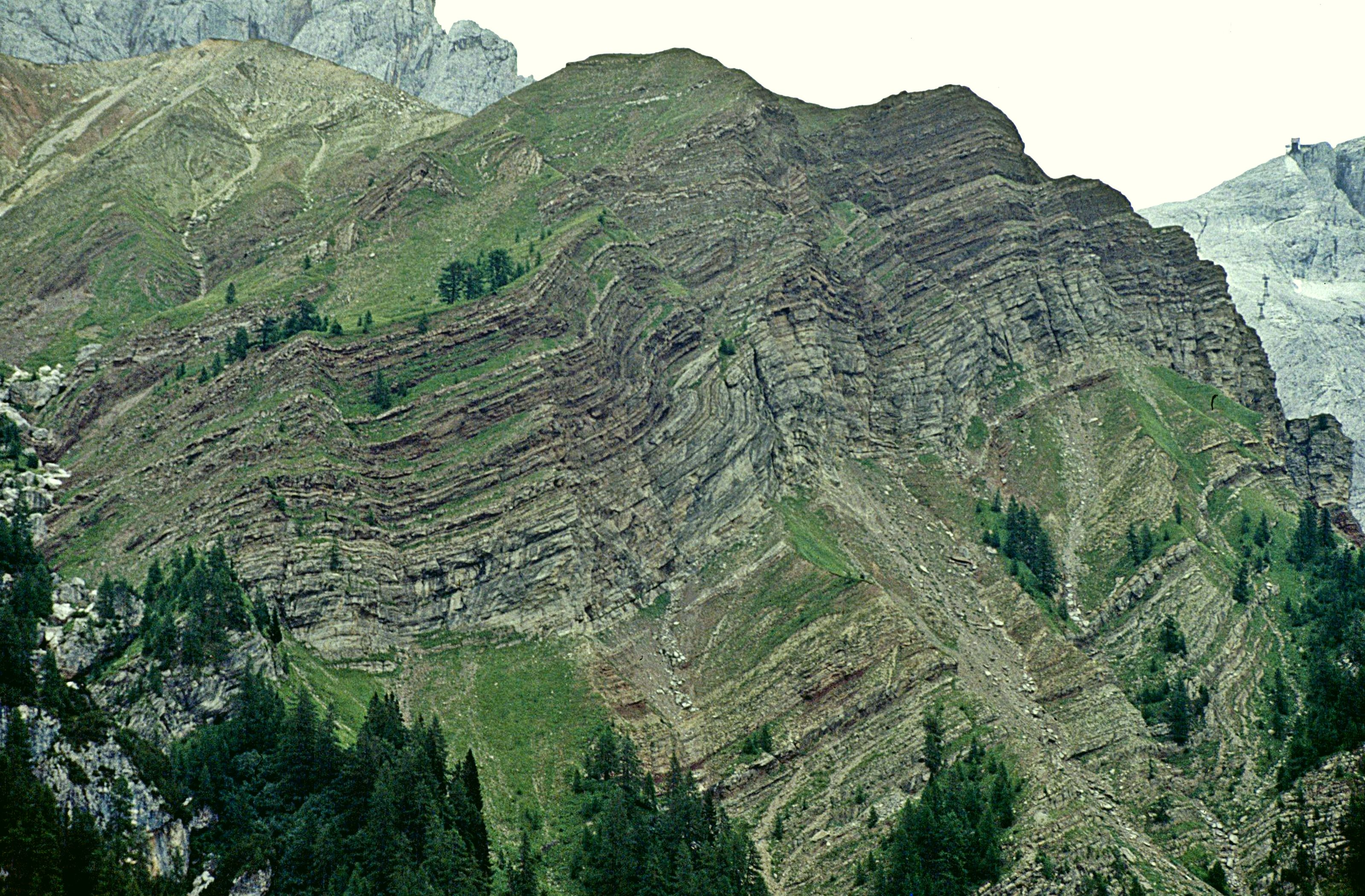 geologische Formation am Rolle-Pass